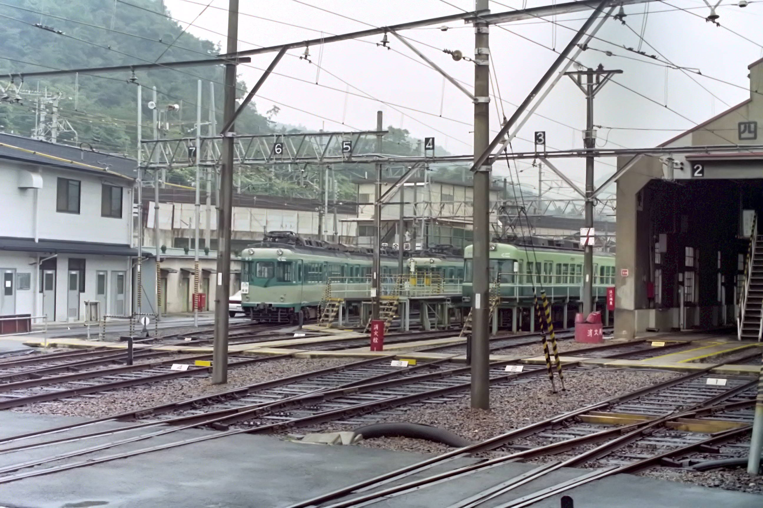 京阪四宮車庫 1997年